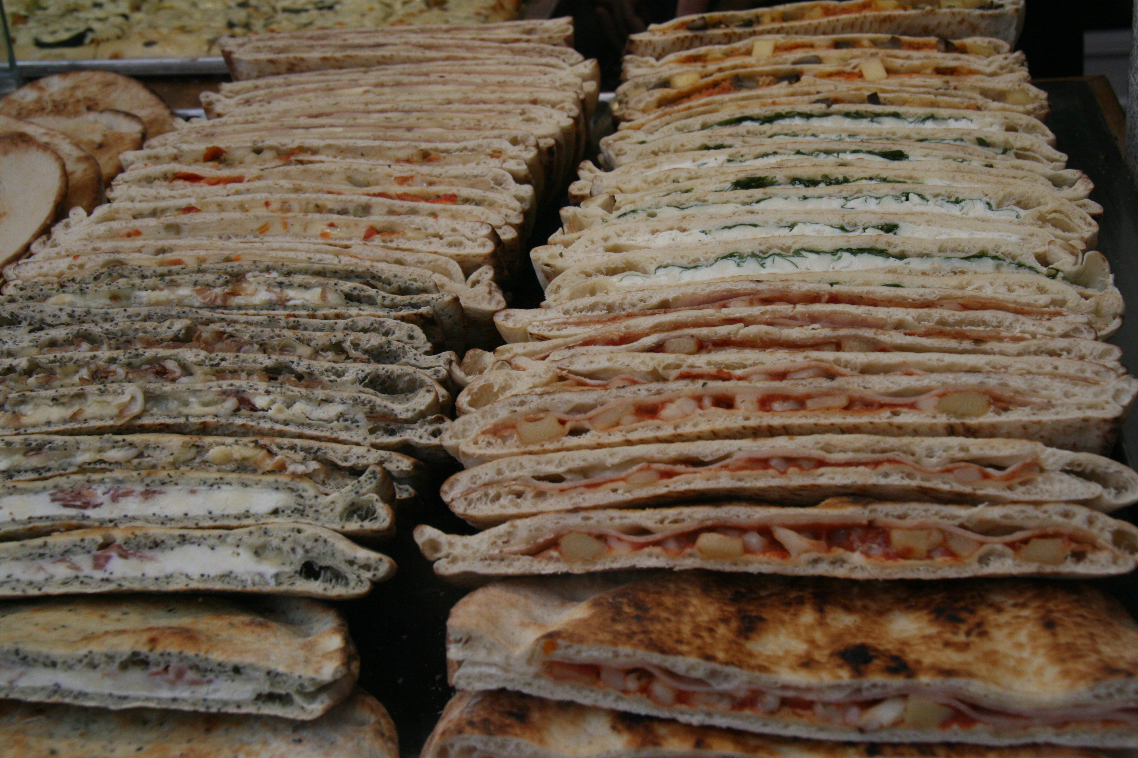 Calzones